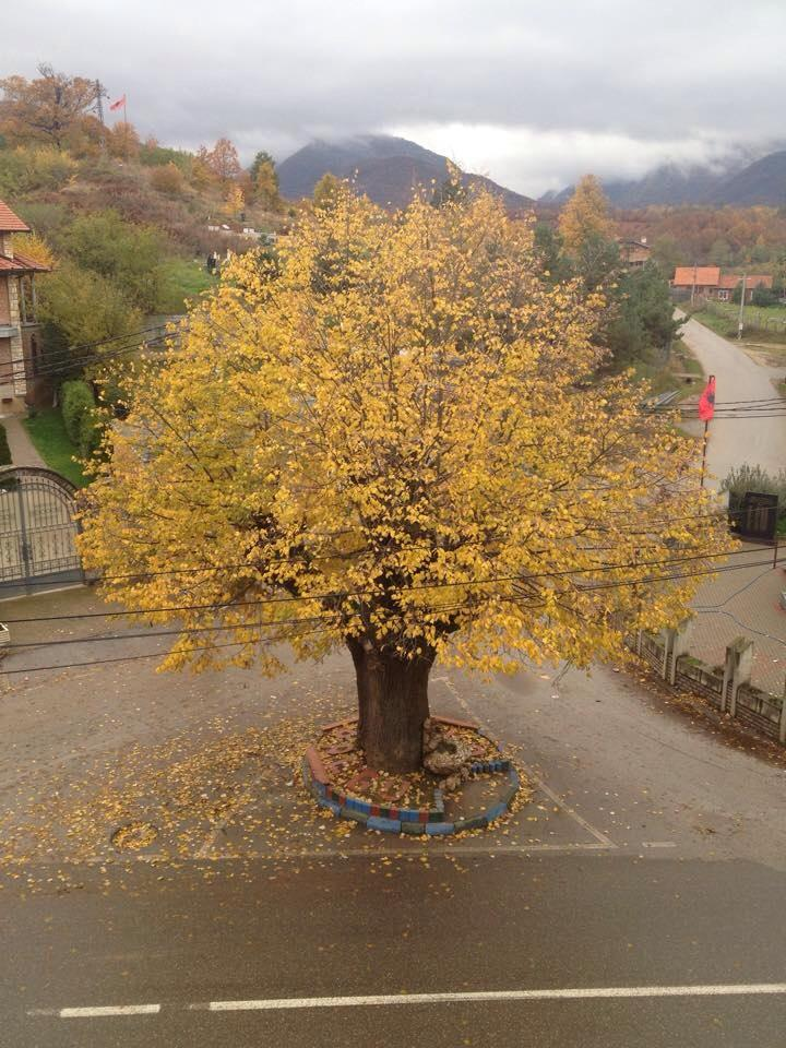 Blini në qendrën e Fshatit Carrabreg